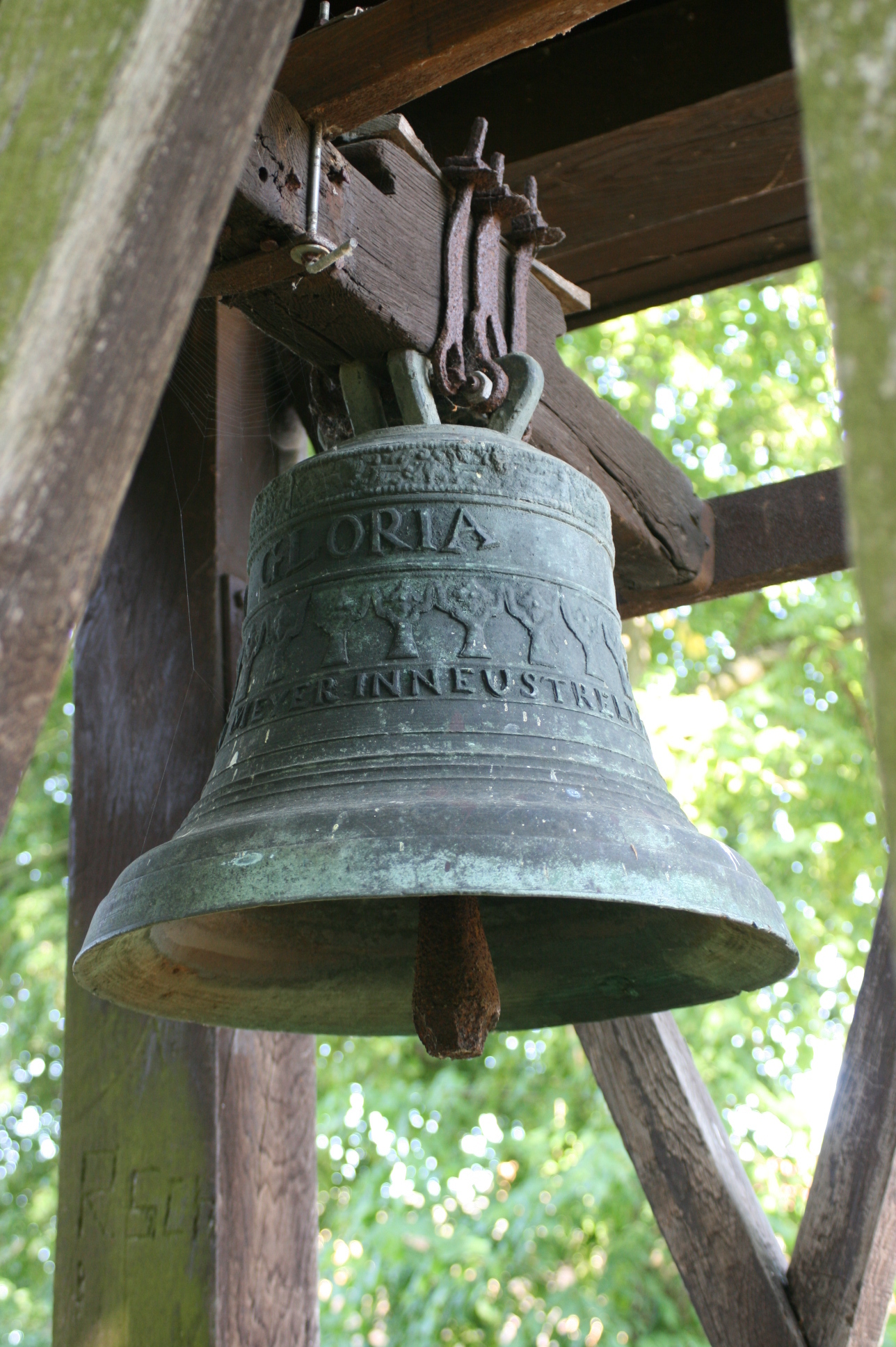 Mirow, Ortsteil Roggentin. Glockenstuhl.